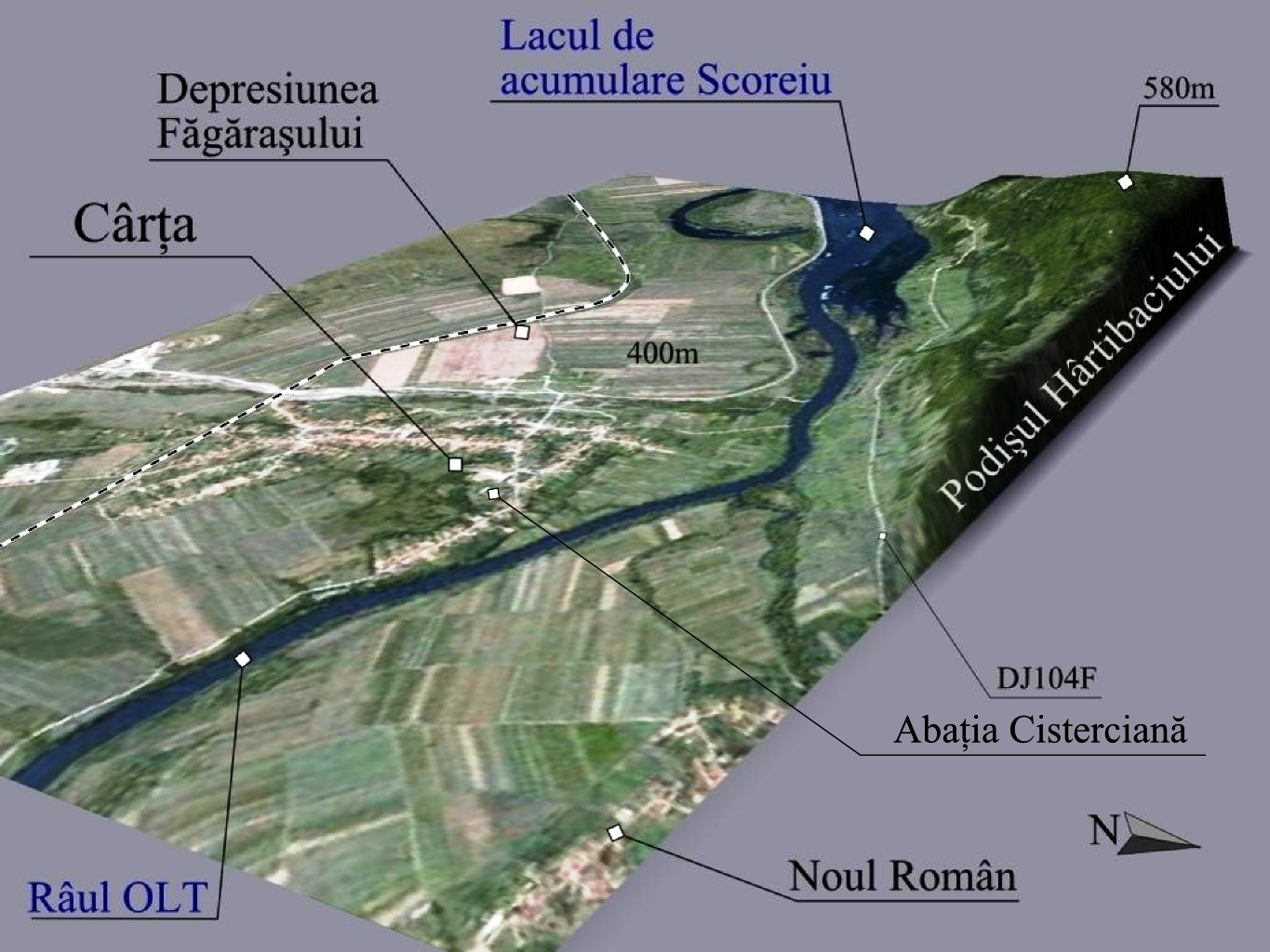 Prelucrare 3D pentru Carta, Sibiu. Imagine realizata cu date SRTM si textura World Imagery.